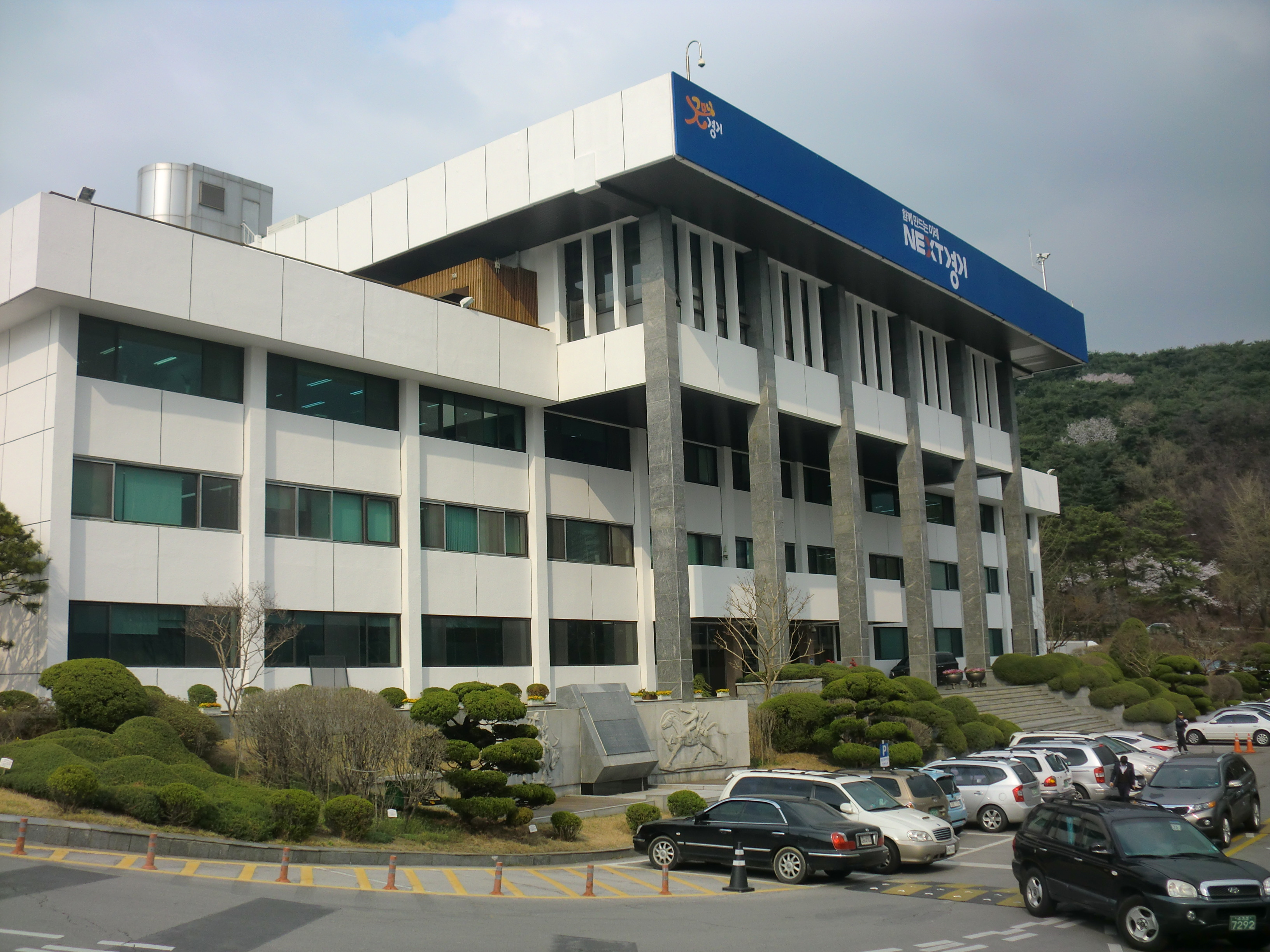 경기도 수원시에 있는 경기도청